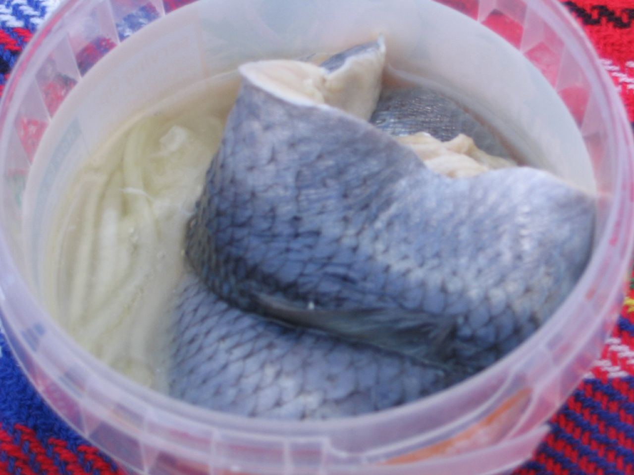 Looks... lovely